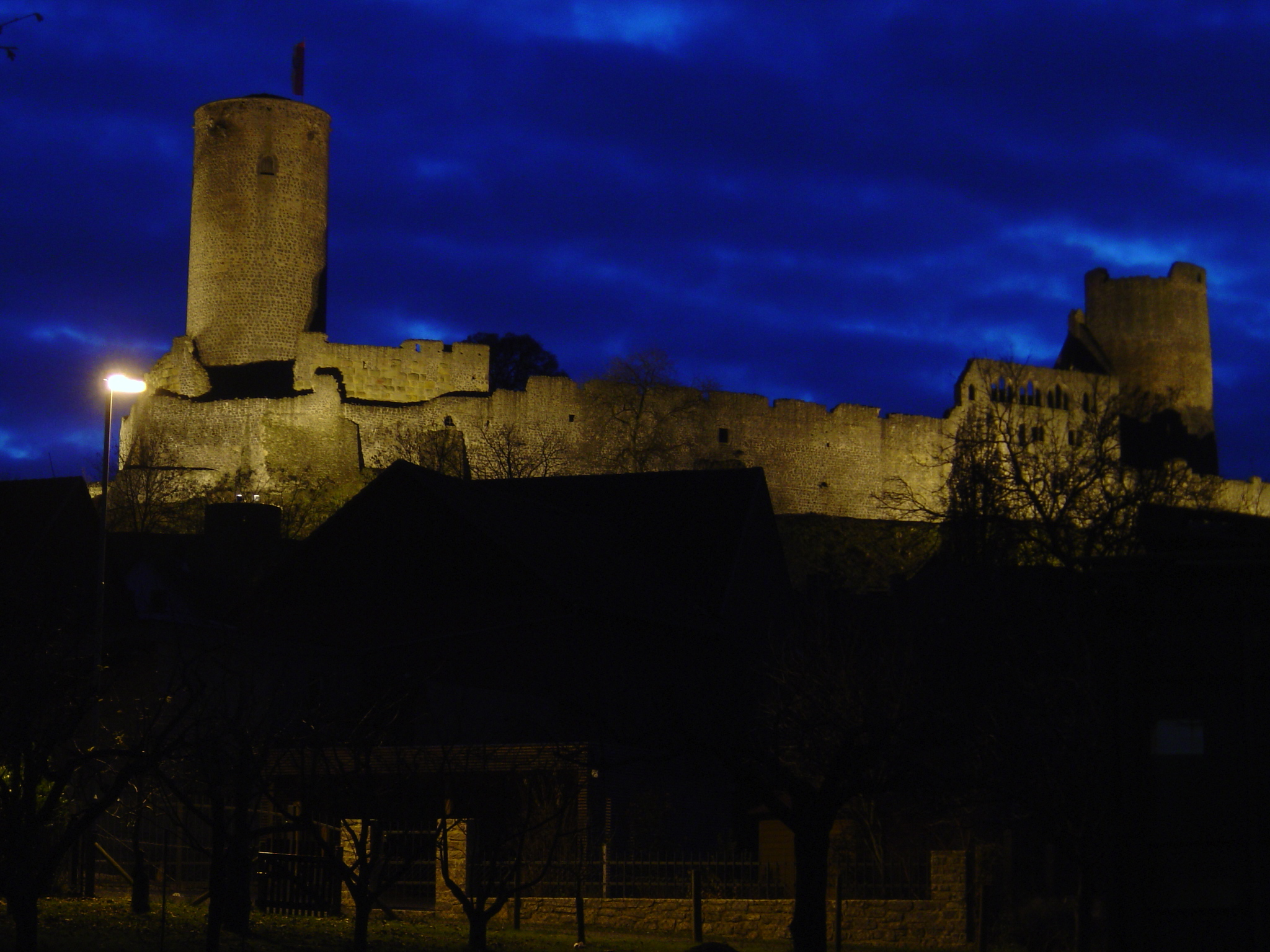 Nordansicht der Burg Münzenberg bei Einbruch der Dämmerung